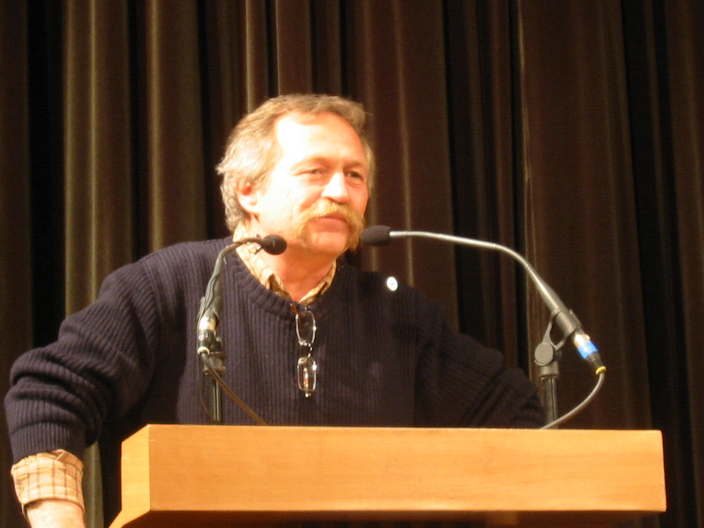 José Bové au meeting des présidentielles de 2007 de Besancon